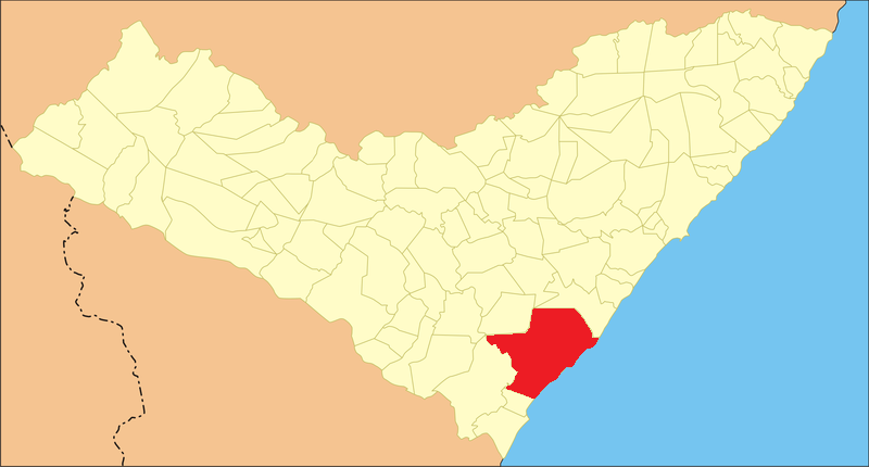 Localização do município de Coruripe, AL, Brasil.